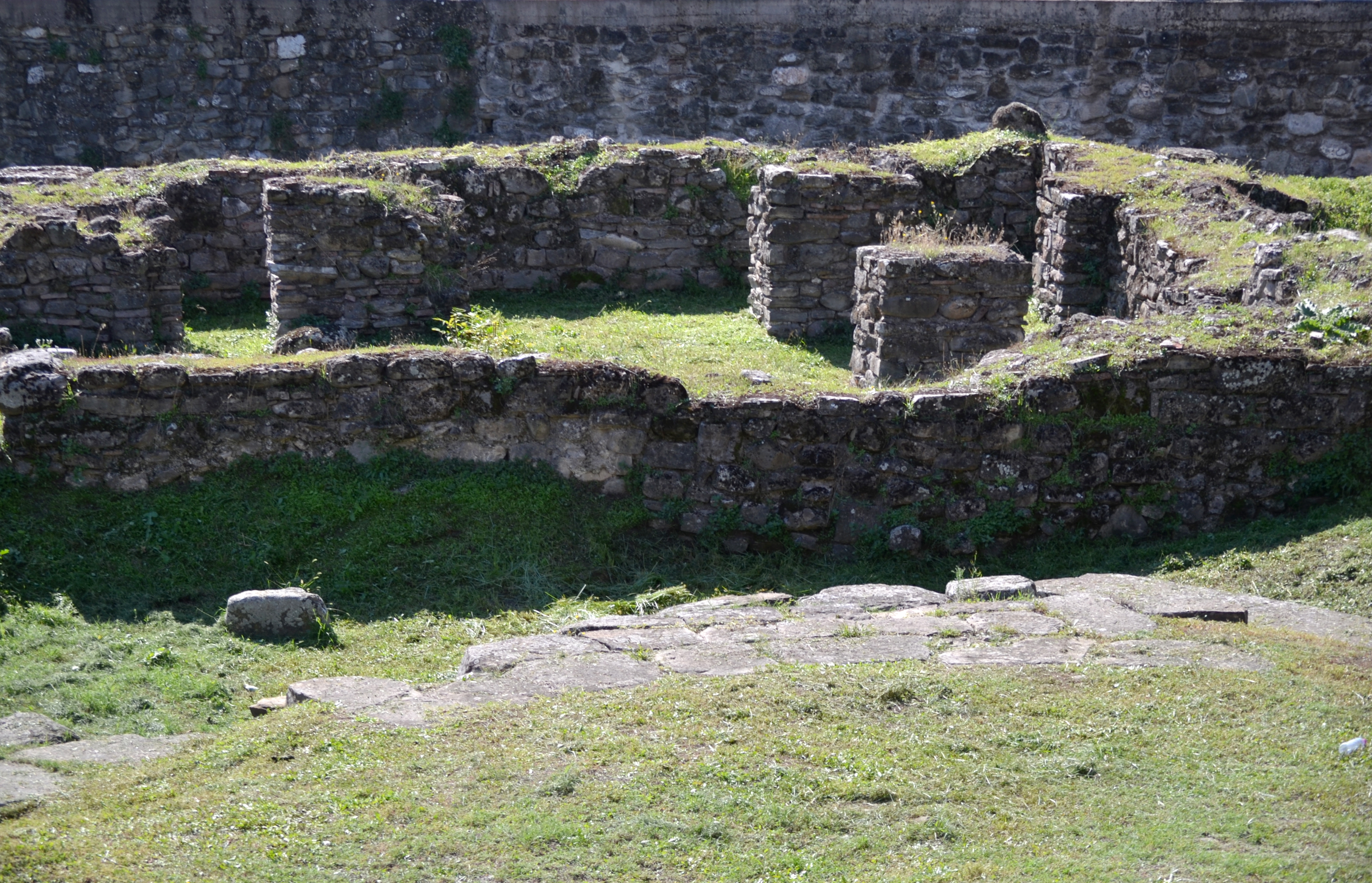 Ασκληπιείο Τρικάλων«Ασκληπιείο Τρικάλων»